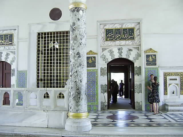 Inside Topkapi Saray, Istanbul, Arz Odasi